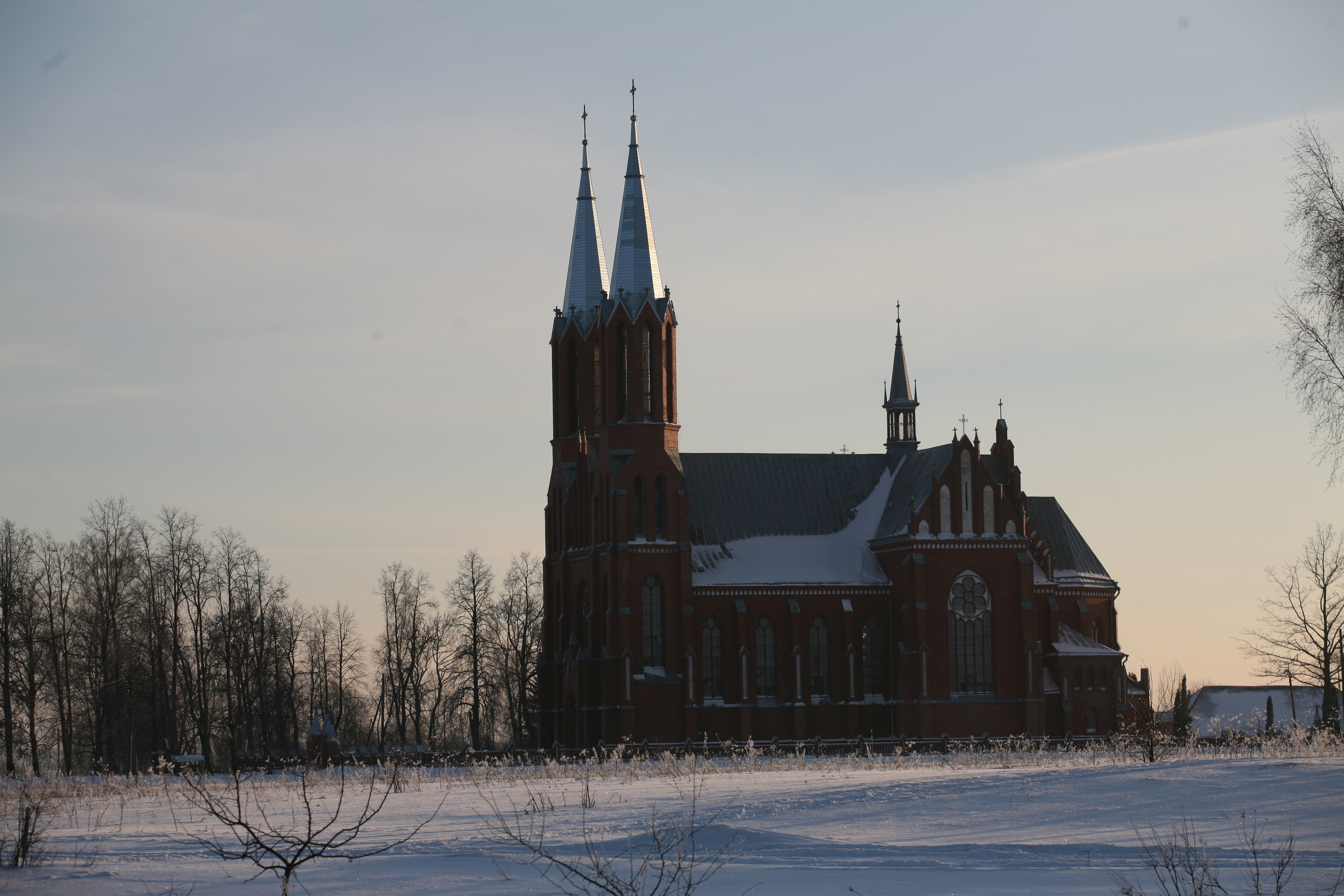 Līksnas Romas katoļu draudzes Vissvētākās Jēzus sirds baznīca